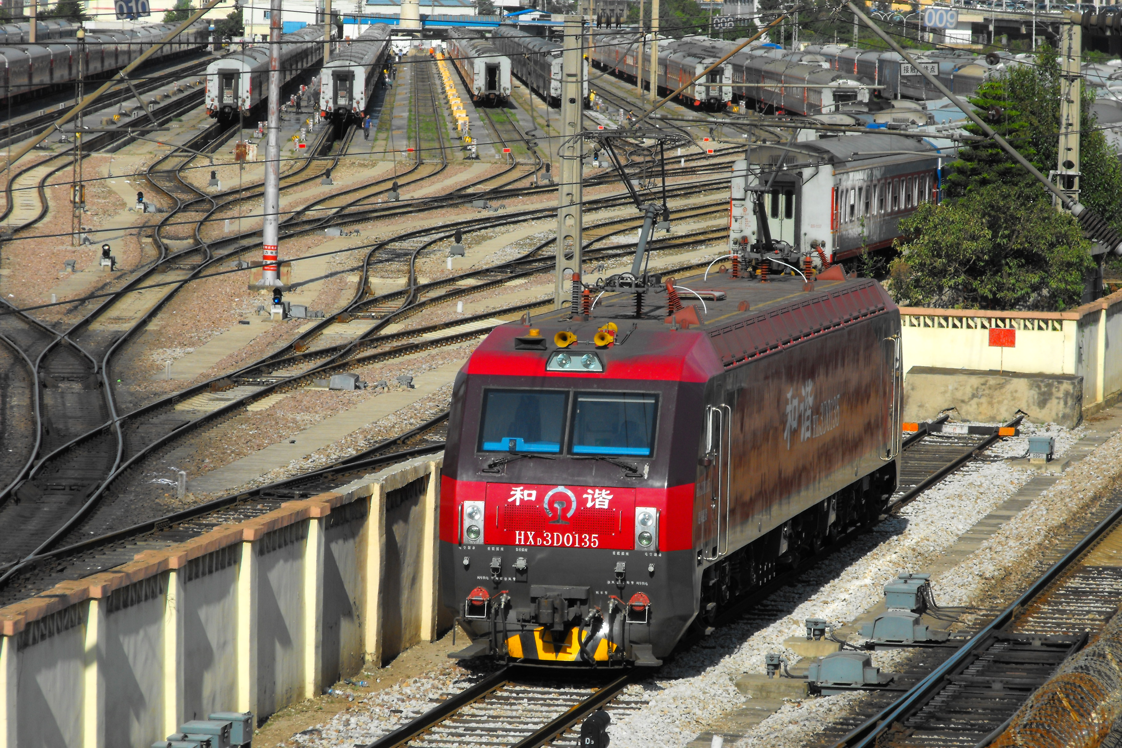 ChinaRail loc. HXD3D0135 in Kunming.